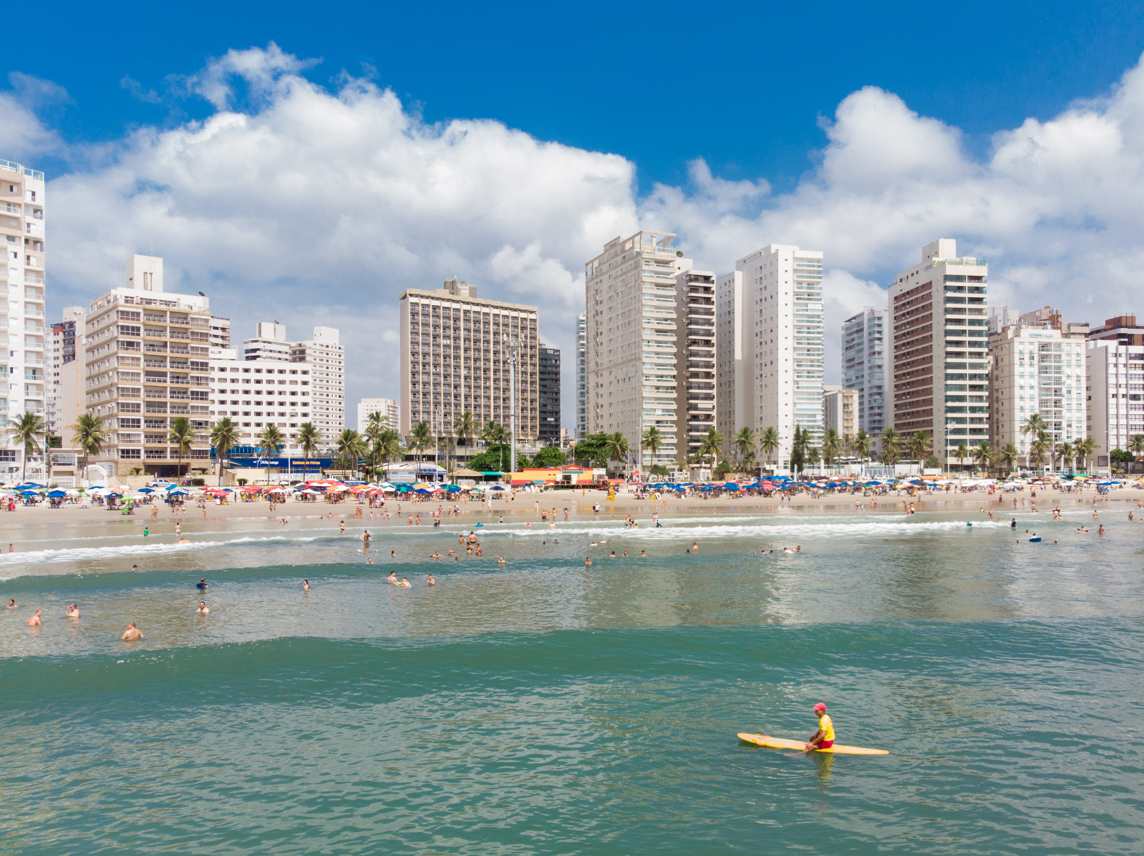 Operação Praia Segura no Guarujá.Data: 22/01/2019. Foto: Governo do Estado de São Paulo